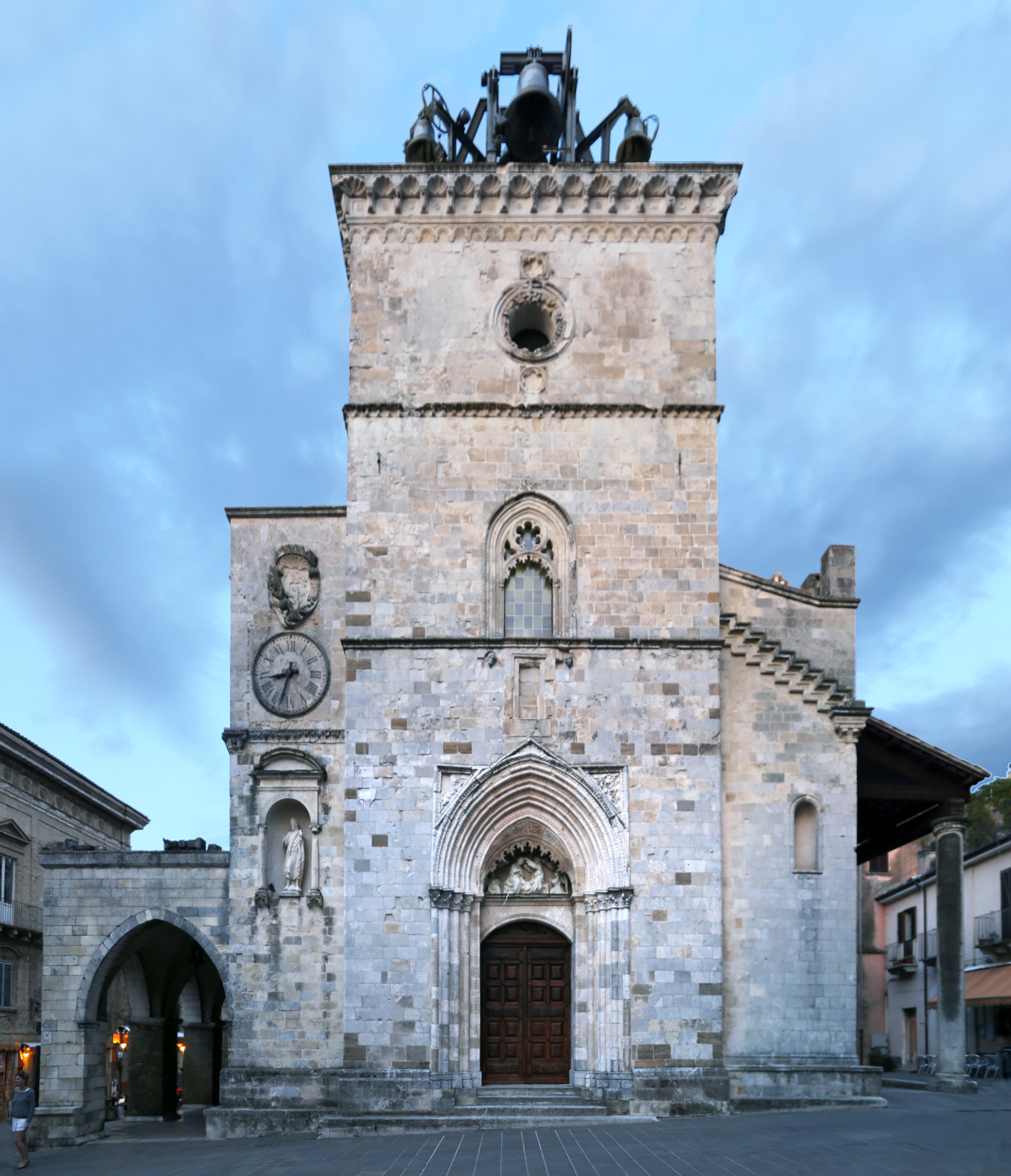 Piazza Santa Maria Maggiore This is a photo of a monument which is part of cultural heritage of Italy.